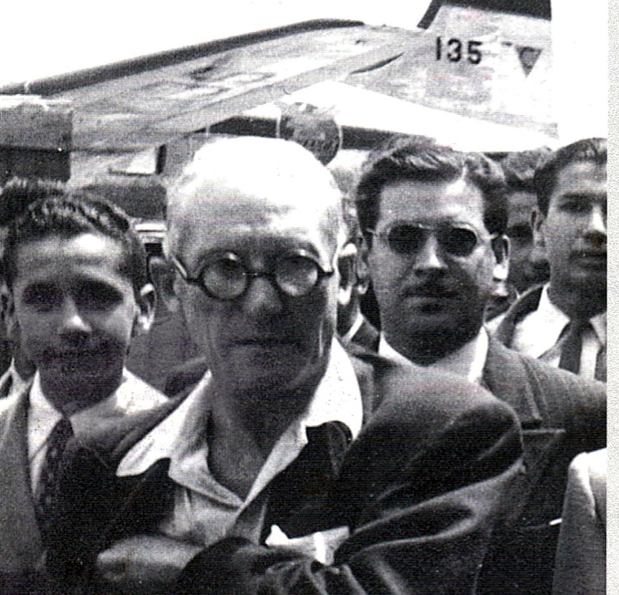 El arquitecto Le Corbusier es recibido en el Aeropuerto de Techo de Bogotá por Hernando Vargas Rubiano, Presidente de la Sociedad Colombiana de Arquitectos (1948)